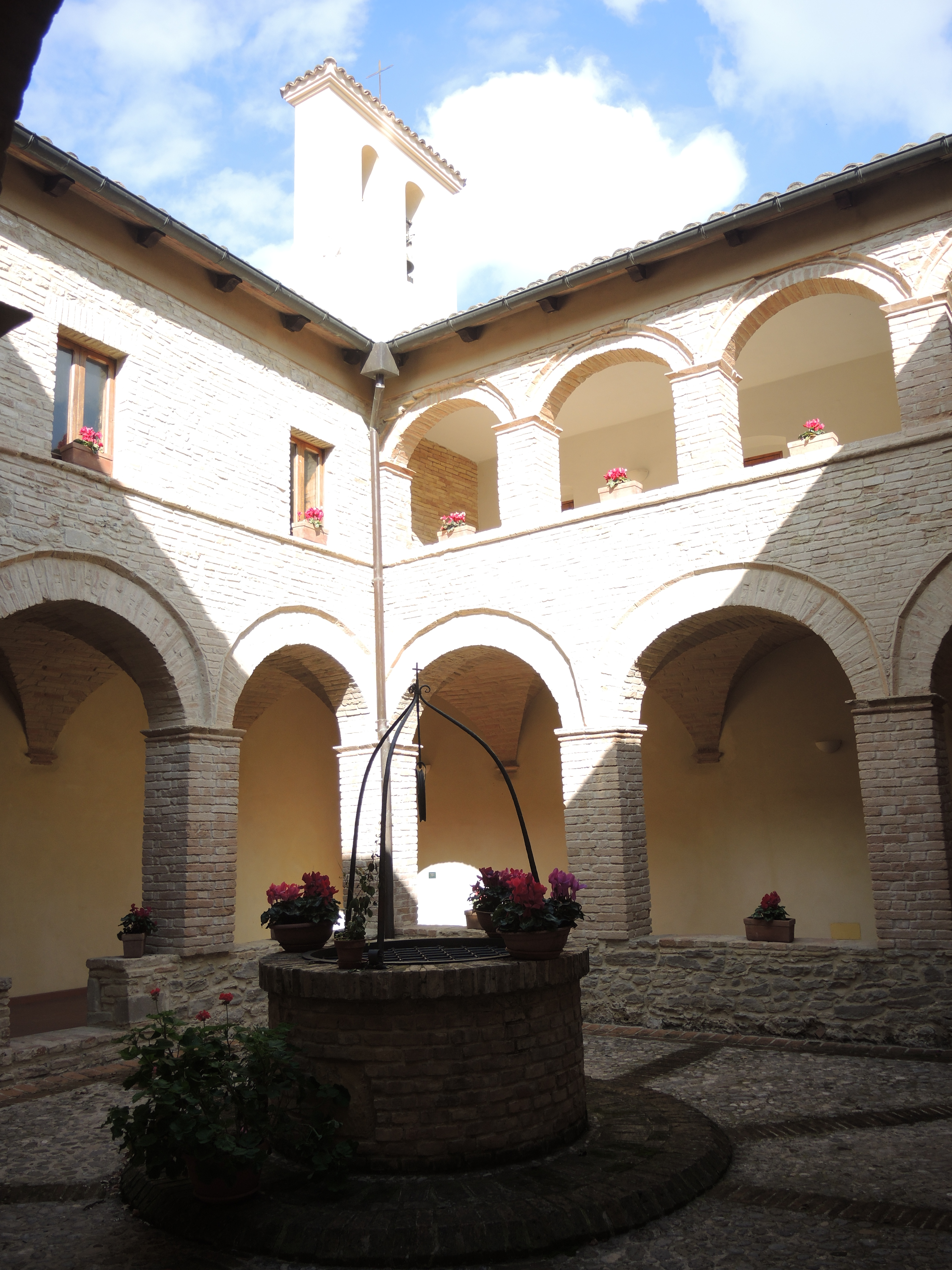 Orsogna: Convento della Santissima Annunziata